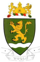 coat Budapest 14 district